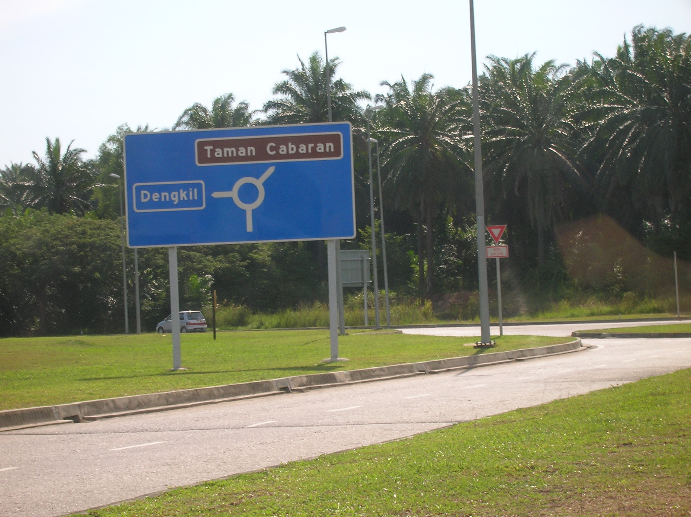 Papan tanda di bulatan di Presint 20, Putrajaya: Dengkil + Taman Cabaran